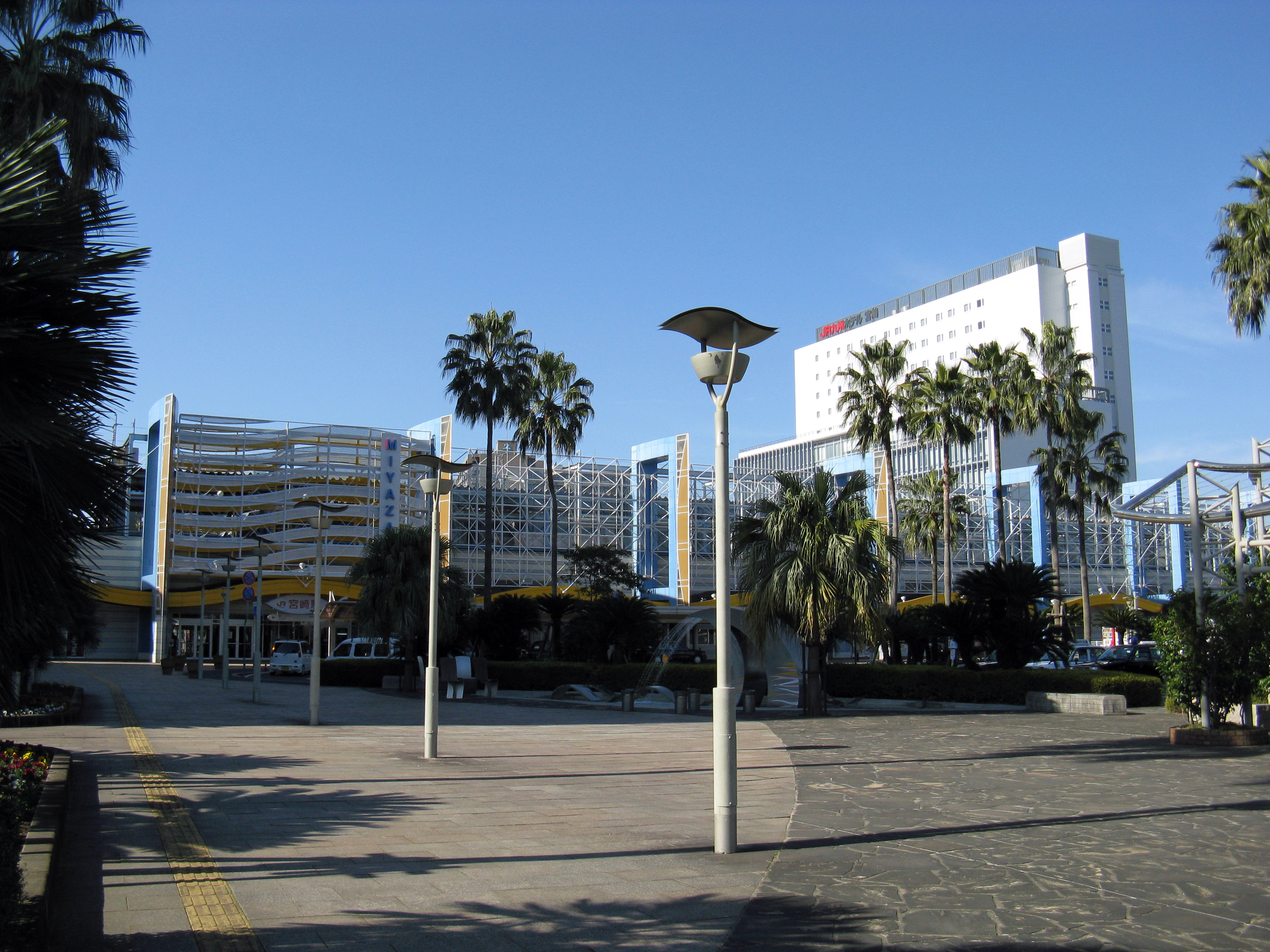 宮崎駅東口 2011年12月